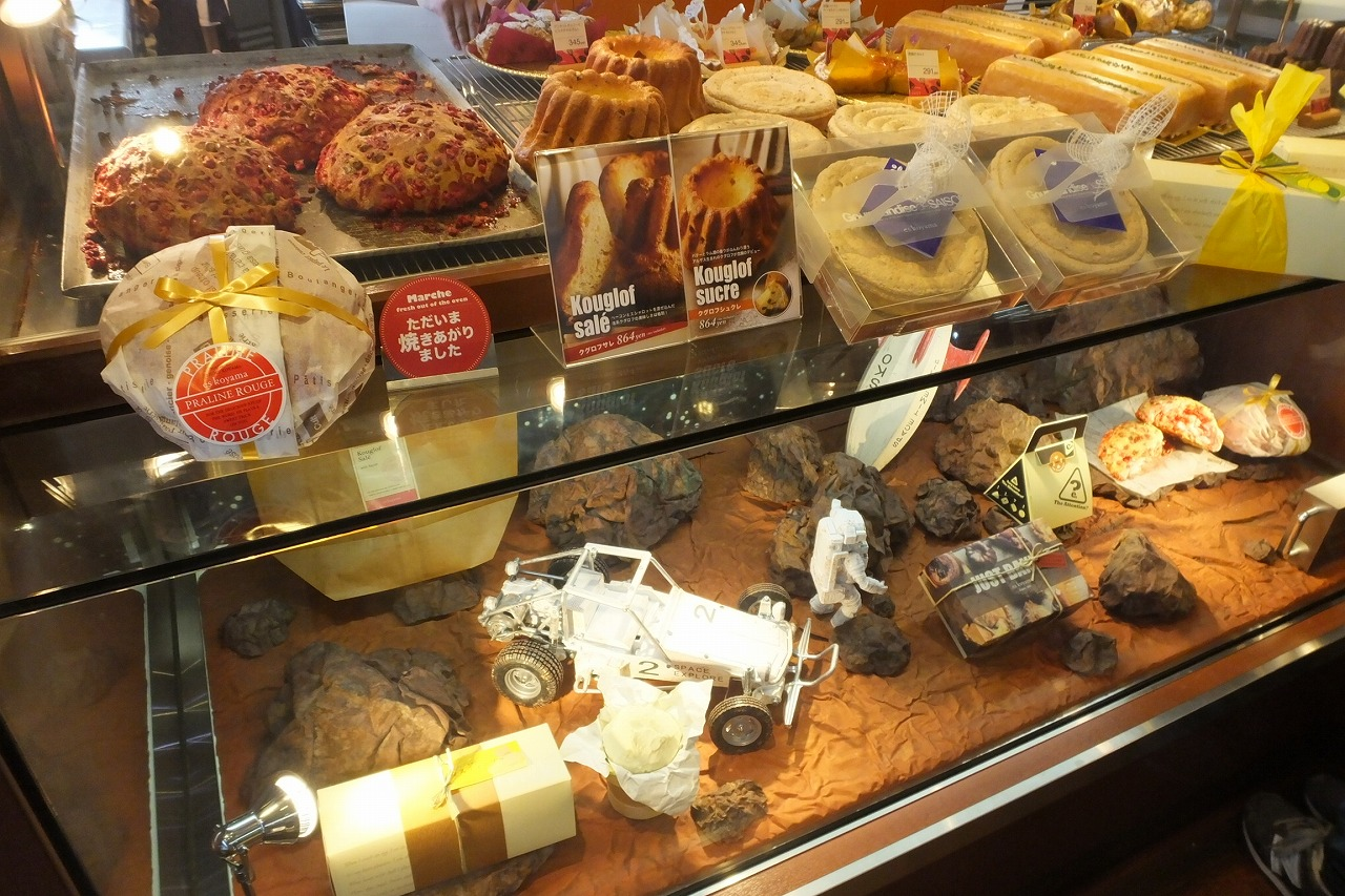 20190904 PATISSIER eS koyama パティシエ エス コヤマ 小山進